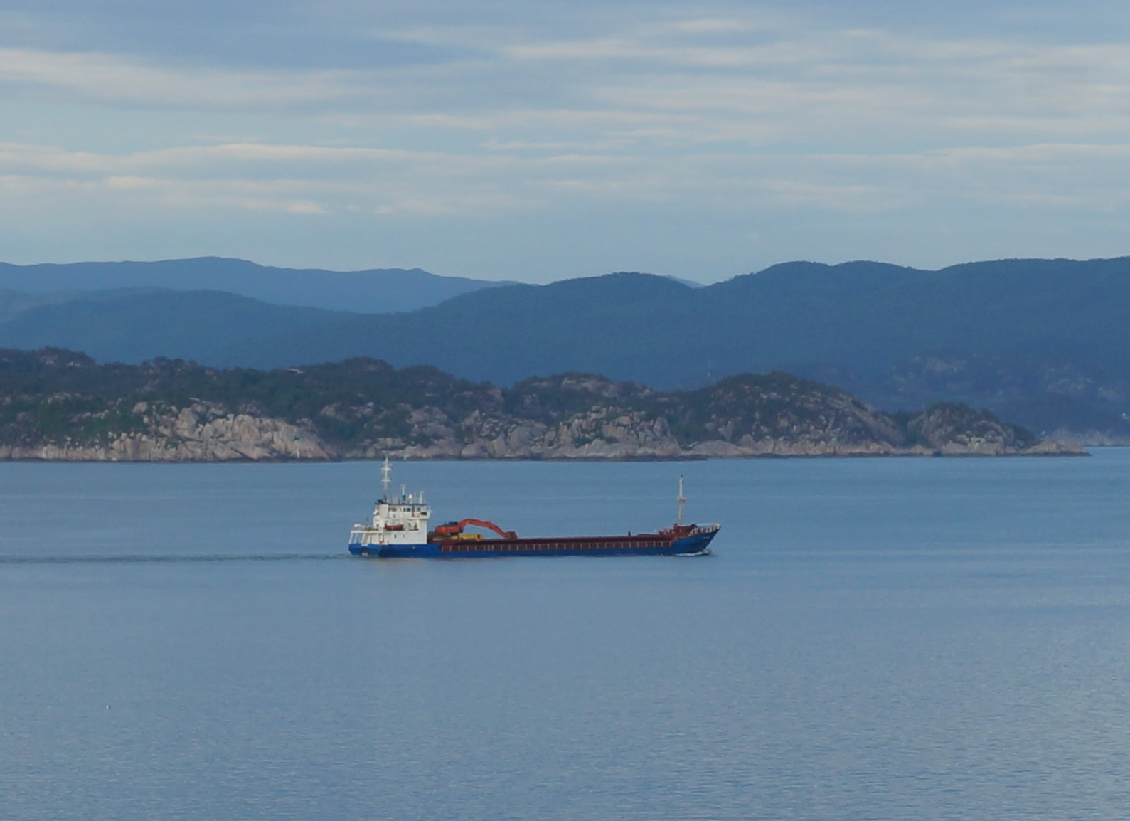 «Vestbris» i Korsfjorden